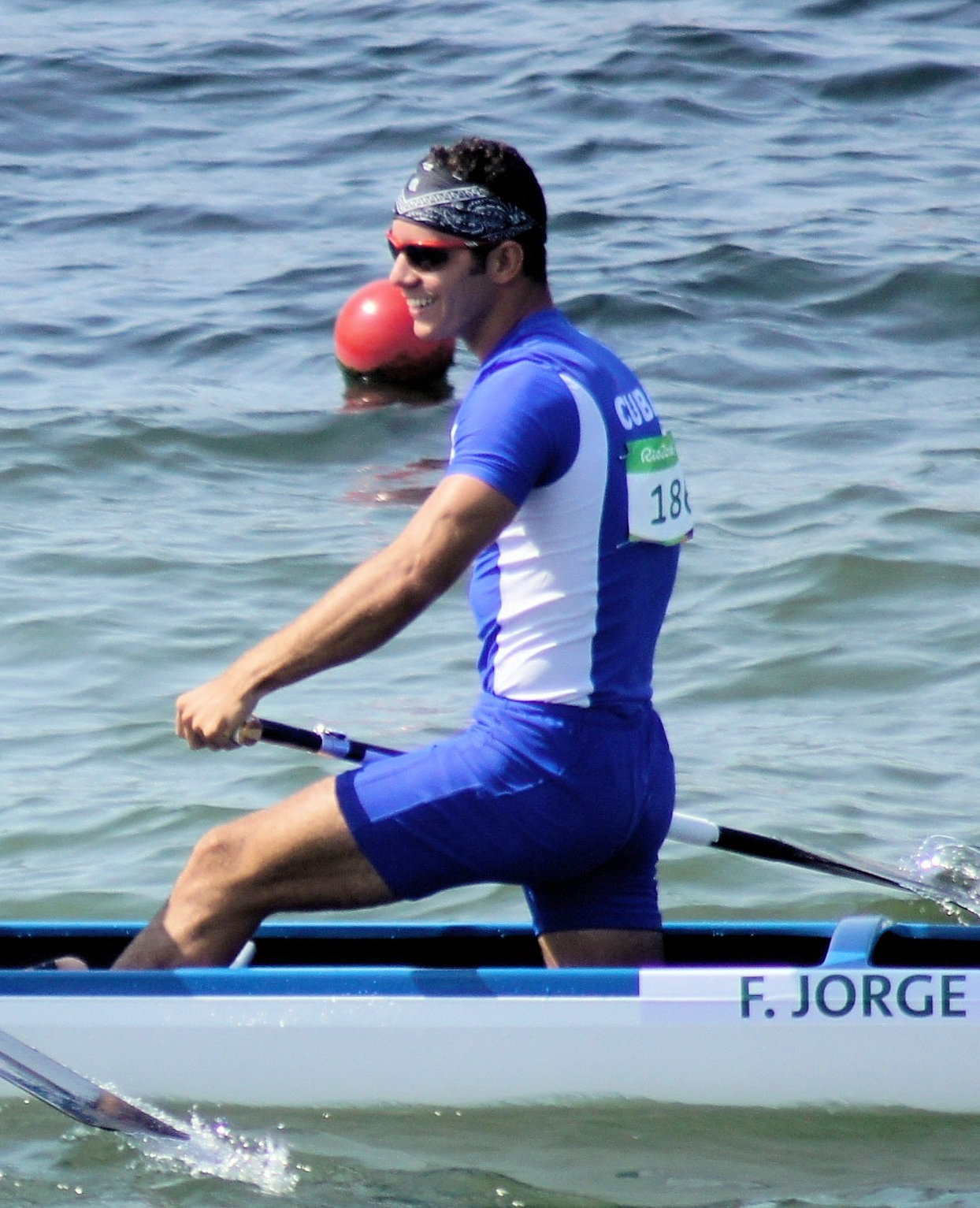 Rio 2016. Canoagem de velocidade/Canoe sprint